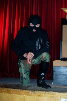 Description : photo de présentation du réalisateur Jean-Jacques Rousseau, le cinéaste de l'absurde. Auteur : Cimon de Siraine (Collection privée) Document publié avec l'autorisation de l'auteur